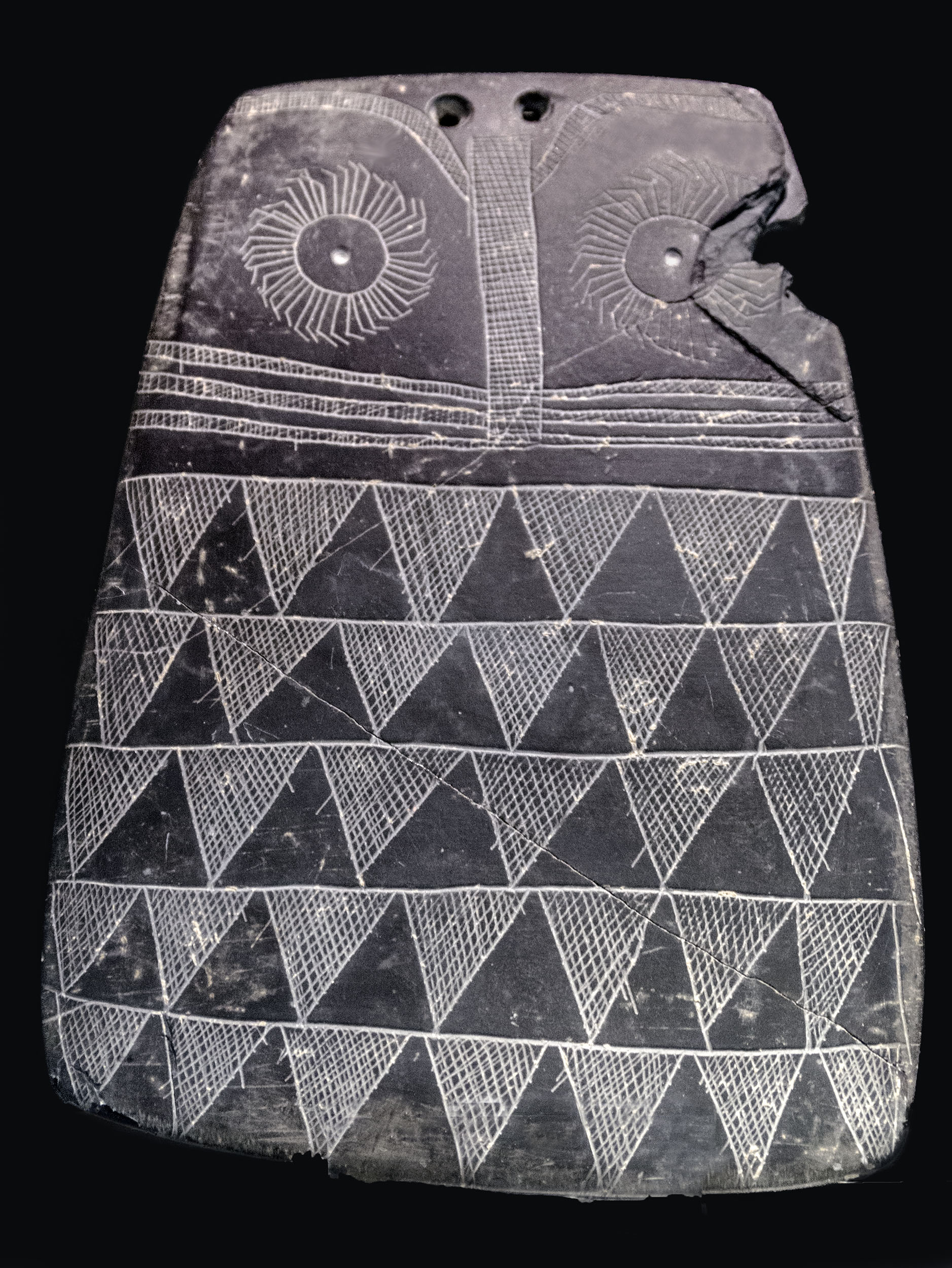 Se trata de una placa de pizarra de unos 20 cm de alto, encontrada en Valencina de la Concepción, Sevilla, y peteneciente al Calcolítico, entre 3000 y 2100 a.C. Estas placas parecen esquematizar rostros y aparecen con frecuencia en los los dólmenes del SO de la Península Ibérica.